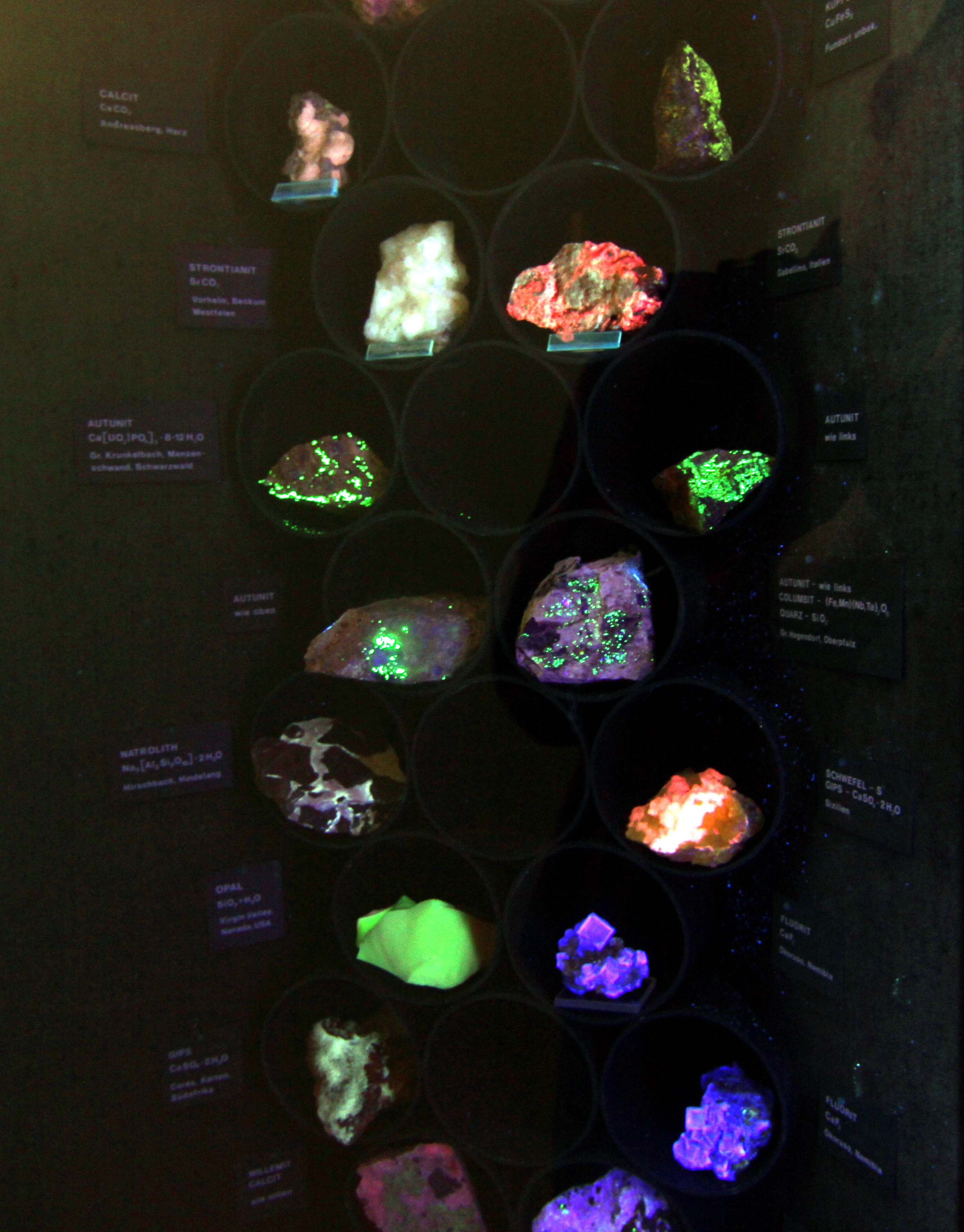 Zumsteinhaus vor der Schließung für den Umbau im April 2015 Fluoreszierende Minerale in einer UV-Kabine Zumsteinhaus Kempten